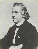 Billede af komponisten Niels W.Gade (1817-1890)